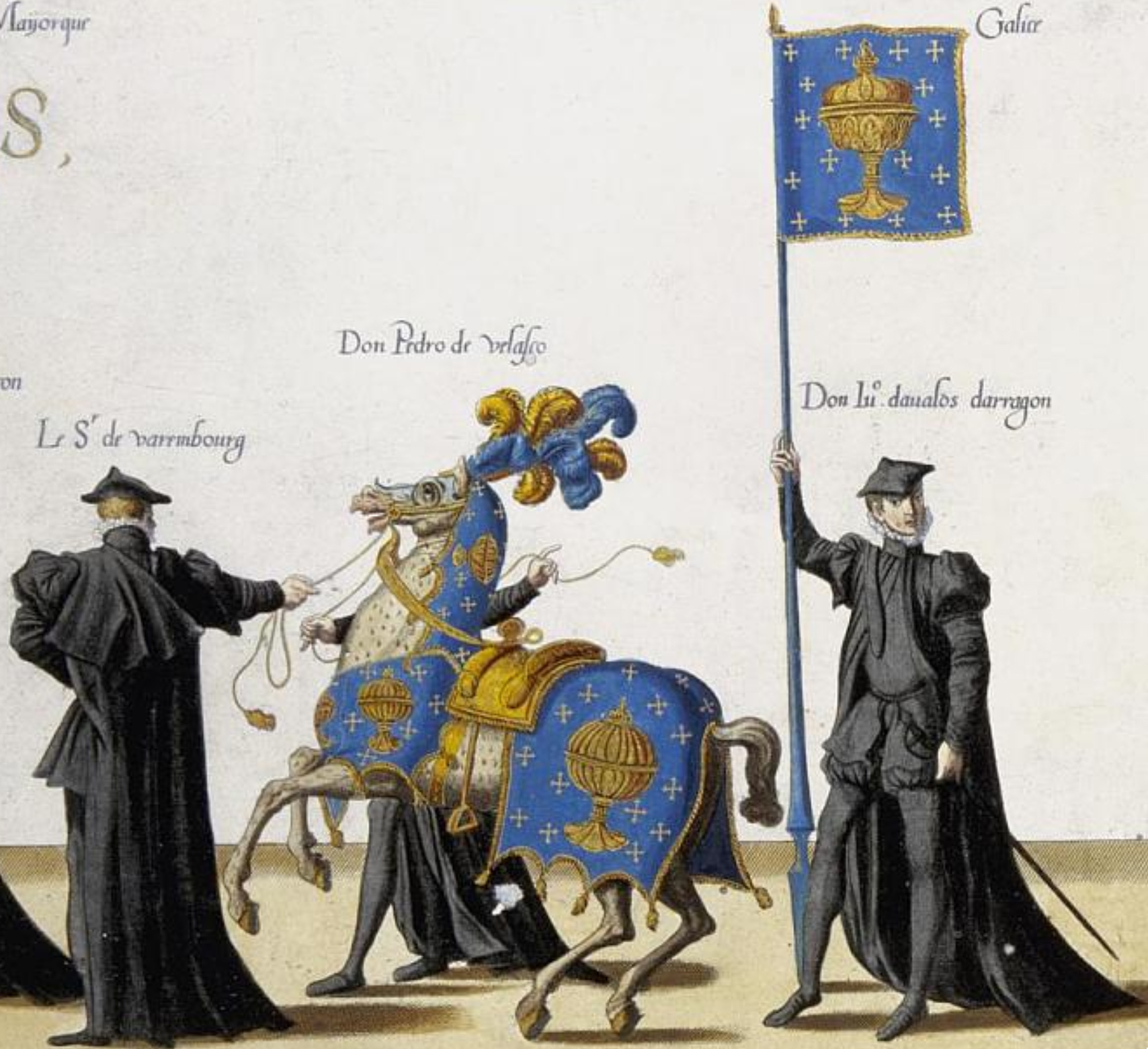 Escudo e estandarte do reino de Galicia nas Pompas fúnebres con ocasión da morte do Emperador Carlos V de Habsburgo.